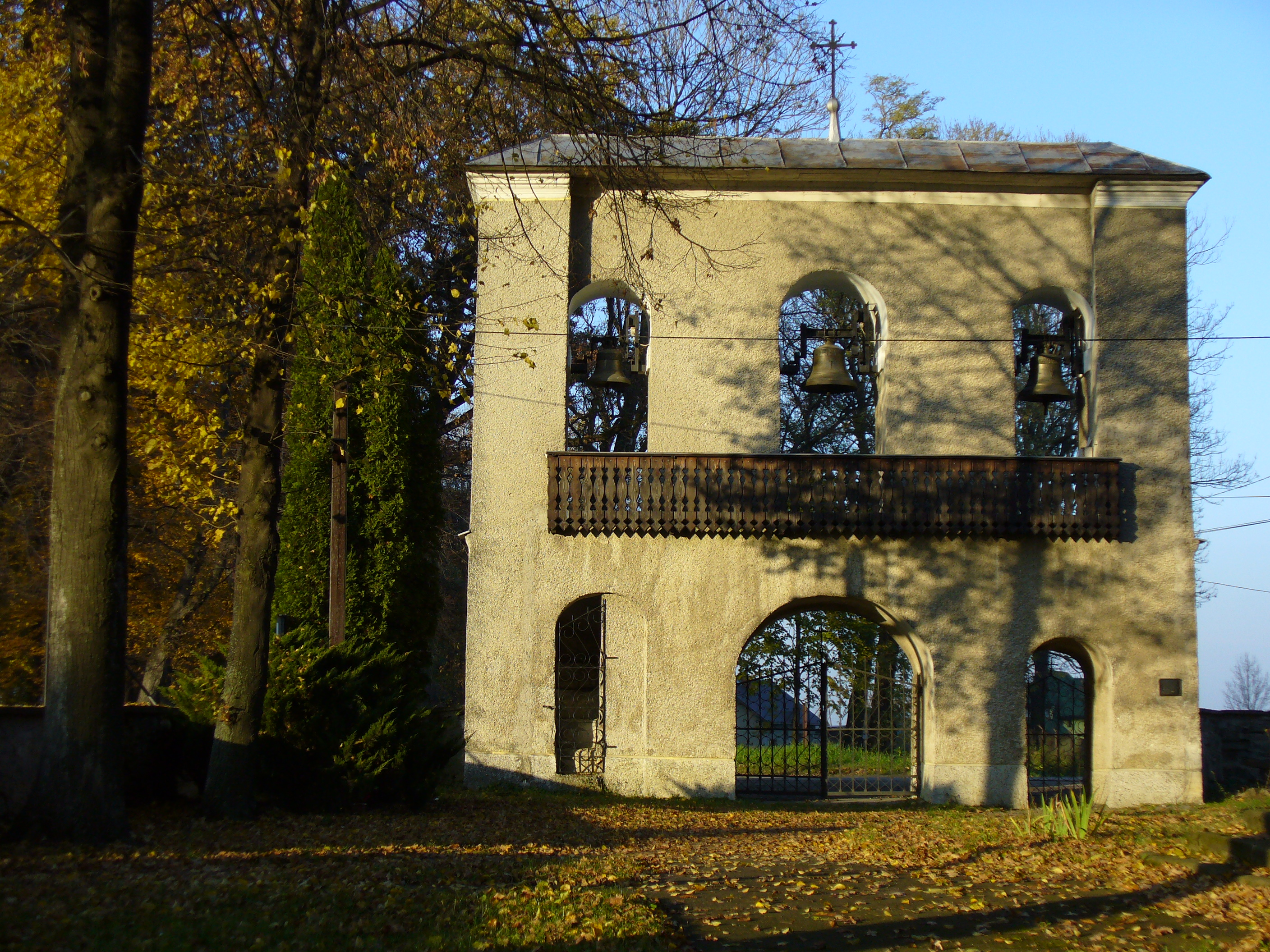 Besko